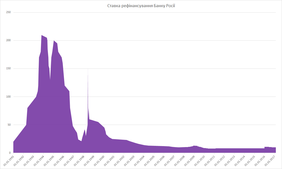 Ставка рефінансування Банку Росії з 1991 р. Примітка: З 1 січня 2016 р. значення ставки рефінансування відповідає значенню ключової ставки Банку Росії на відповідну дату.